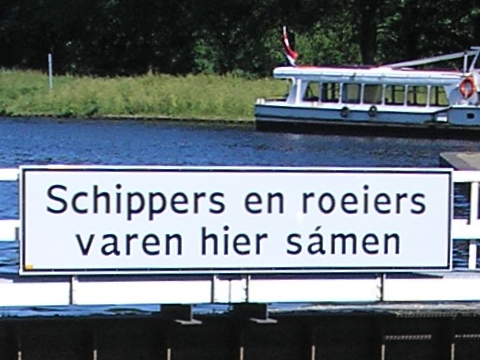 Waarschuwingsbord op de schutsluis Hengelo (in het Twentekanaal) ter voorkoming van aanvaringen tussen binnenvaartnl:schippers en sportroeiers.